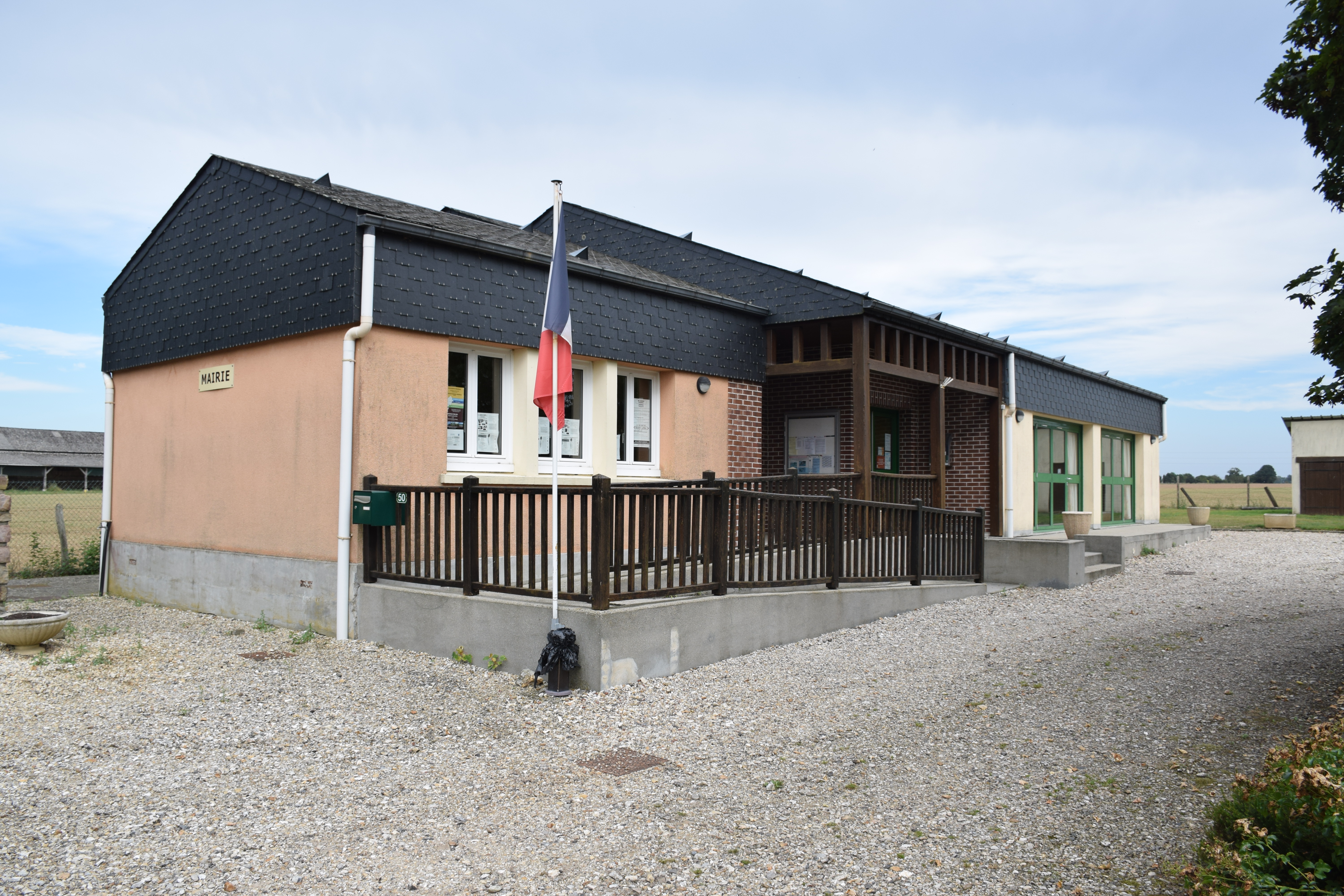 Mairie